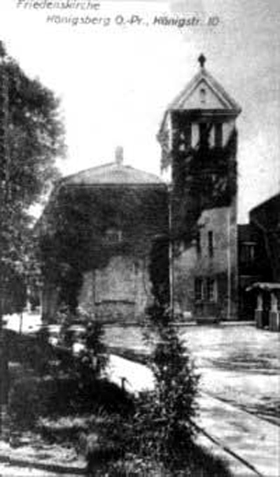 "Церковь мира" в Кёнигсберге, построенная перед Первой мировой войной.